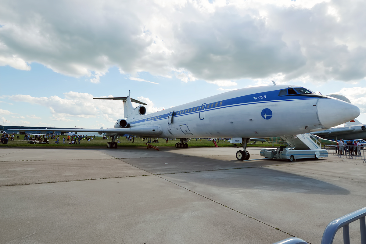 Tupolev Design Bureau, CCCP-85035, Tupolev Tu-155